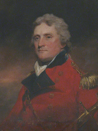 Lieutenant-General Sir Hildebrand Oakes, 1st Baronnet GCB (1754-1822), Governor of Malta